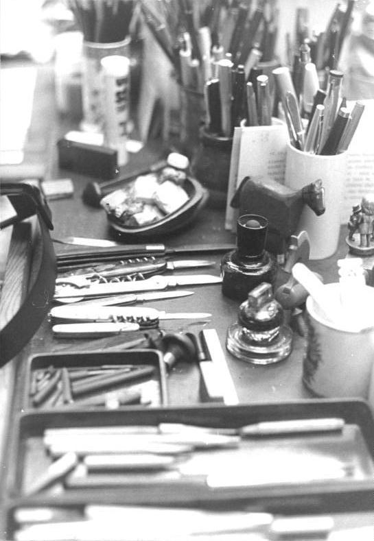 ADN-ZB-Rehfeld-7.1.81-pe-Berlin: So sieht es am Arbeitsplatz des Grafikers und Buchillustrators Prof. Werner Klemke in seiner Wohnung in Berlin-Weißensee aus. Der Künstler genutzt verschiedenartiges "Handwerkszeug" - er bevorzugt keine bestimmte grafische Technik. Sie ergibt sich für ihn aus der literarischen Vorlage, aus den Möglichkeiten des Papiers und des Formats, vor allem aus der Zeit, in der das Buch entstanden ist, und daraus, ob es sich um Lyrik oder Prosa handelt. (siehe 18,20,21N)